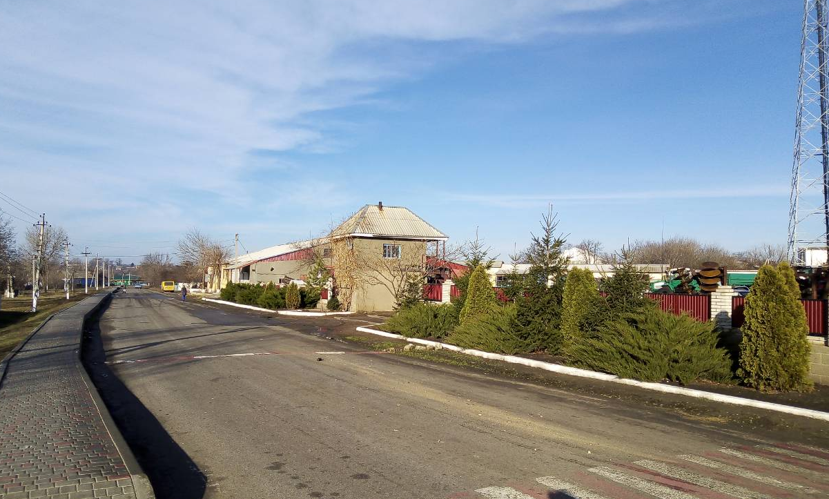 Елеваторна, Затишшя